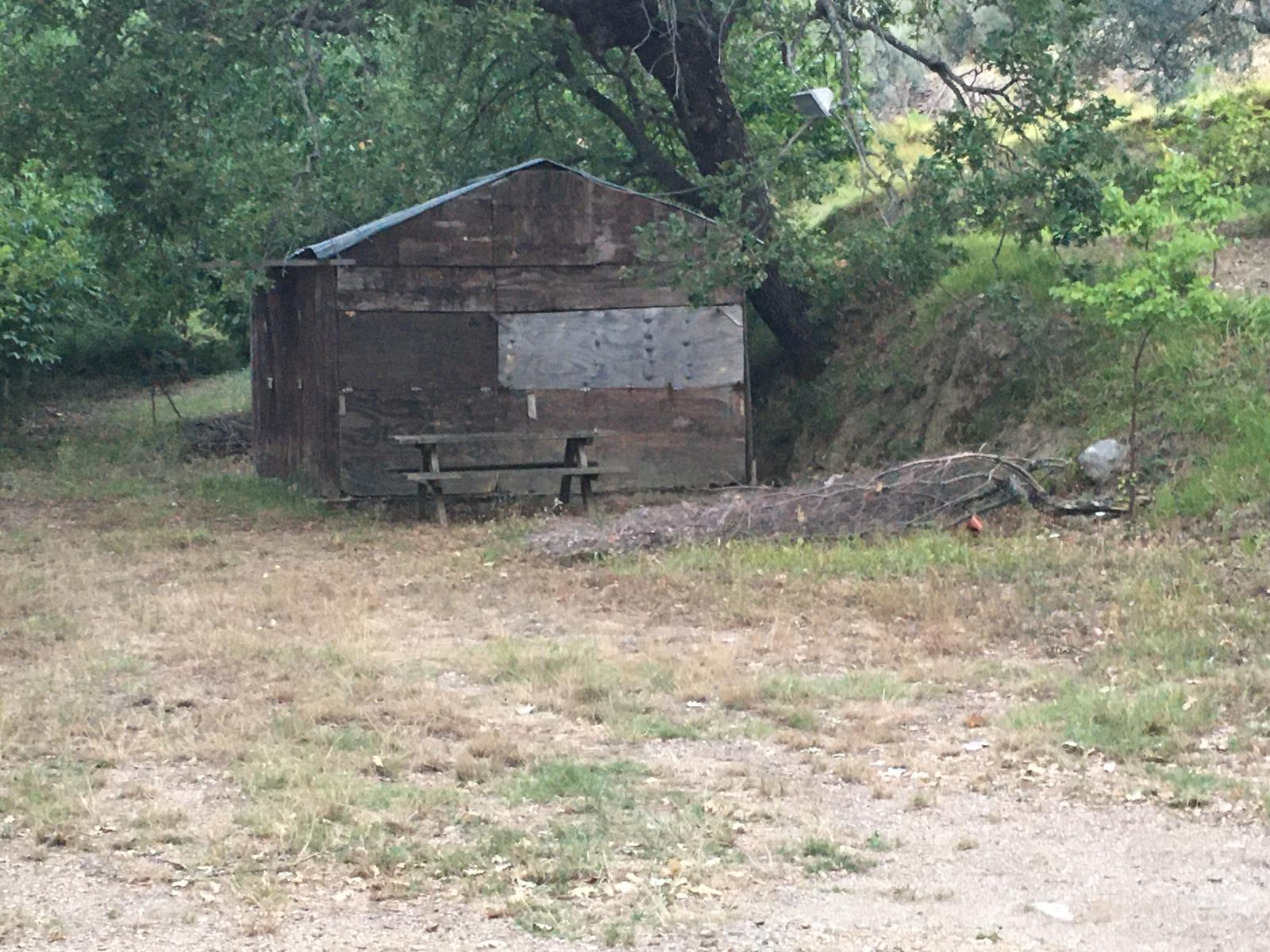 Una Barracca